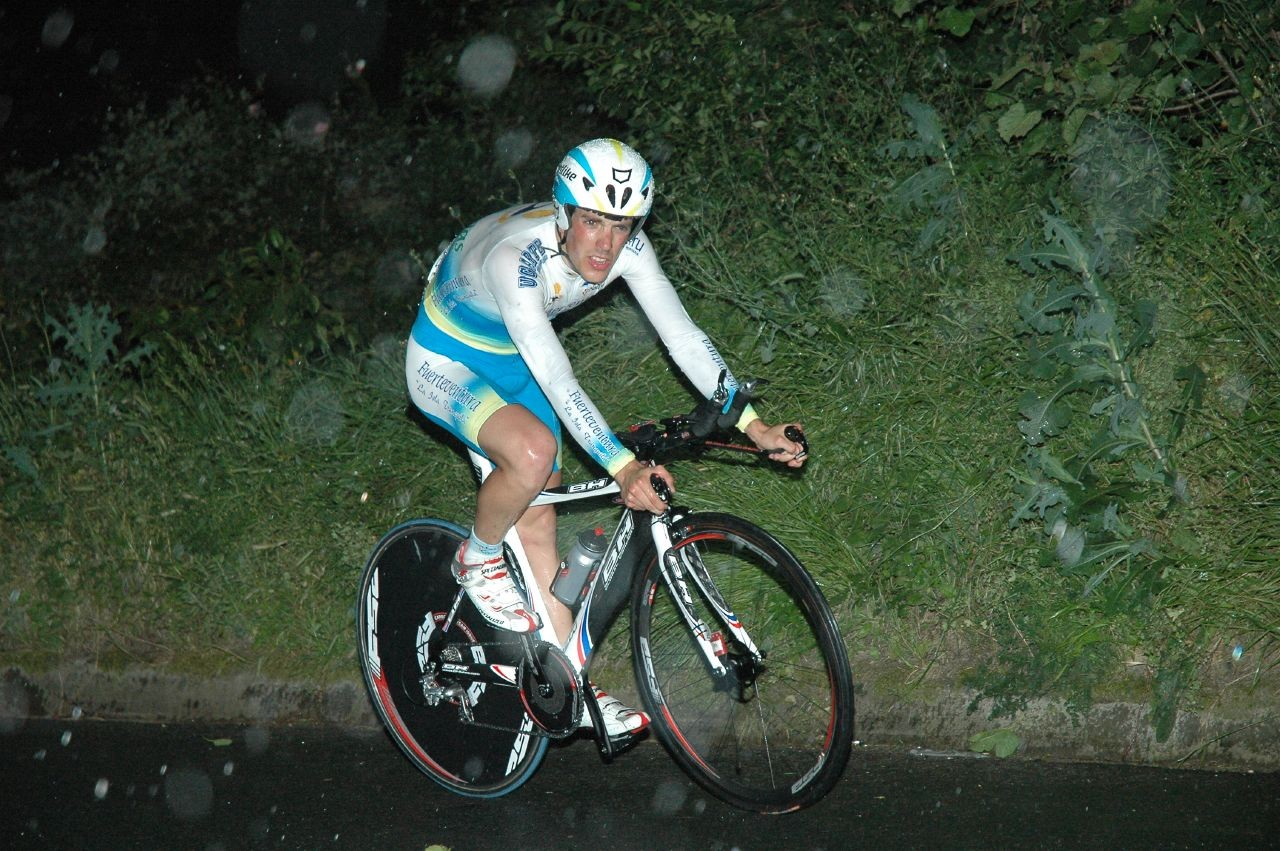 Iker Leonet, Euskal Bizikleta 2007